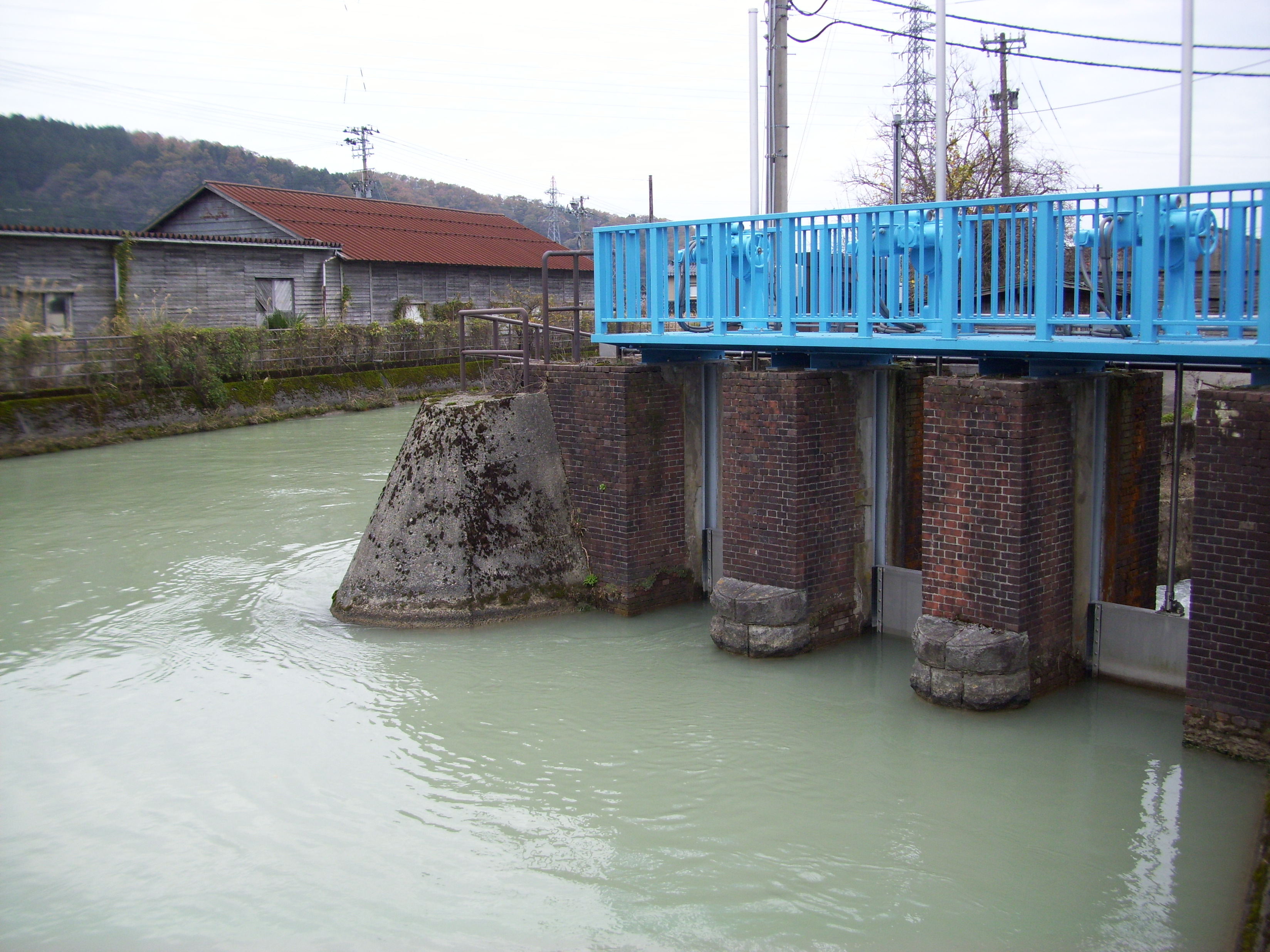 七ヶ用水から分岐する高橋川の取水口